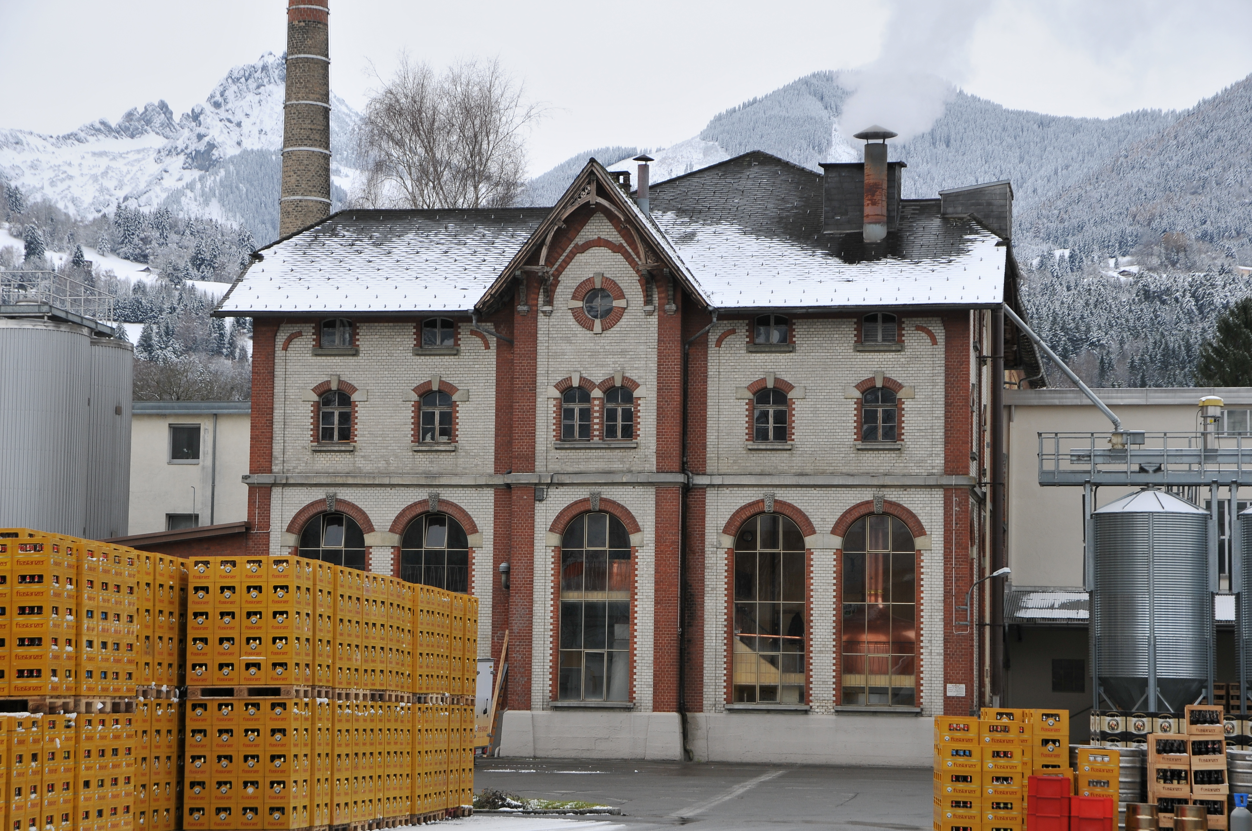 Sudhaus der Vorarlberger Brauereigenossenschaft Frastanz. Die Bierbrauerei gegenüber dem Bahnhof ist ein Ziegelbau mit ornamentalem Dekor, erbaut von 1903 bis 1904 von Christian Zangerl.